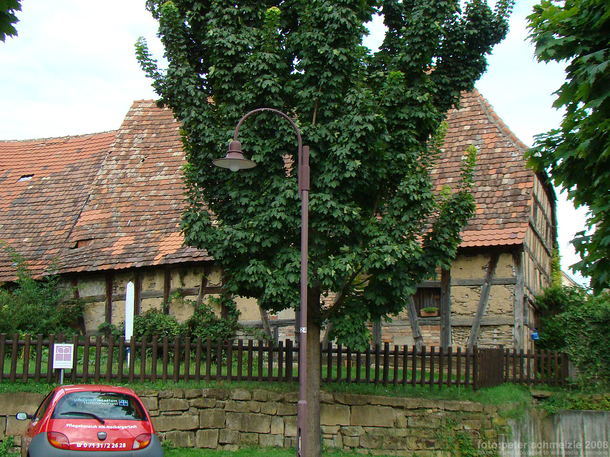 Denkmalgeschützte Stallscheune Mittelstr. 20 in Heilbronn-Neckargartach